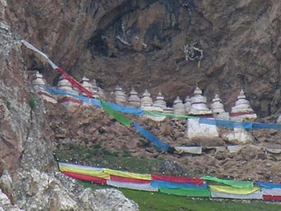 Die hoch über dem Kloster Tana Gompa (Kreis Nangqên, Präfektur Yushu, Qinghai) in einer Felshöhle gelegenen 36 Stupas werden den Generälen des Heldenkönigs Gesar zugeschrieben